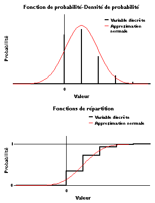 Schéma montrant comment il faut interpréter ce théorème dans le cas de variables discrètes. Image personnelle.